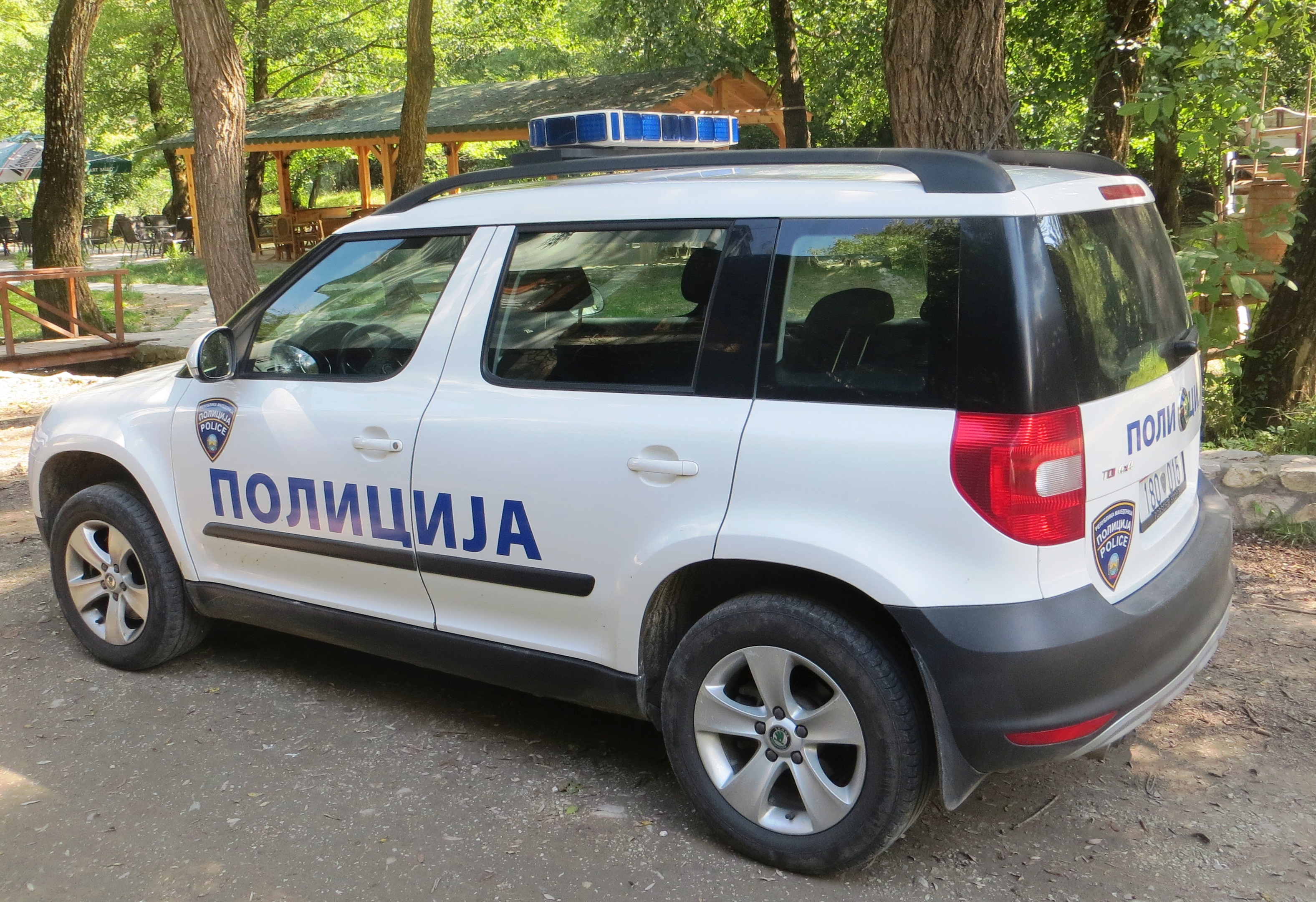 Politie auto uit Macedonië